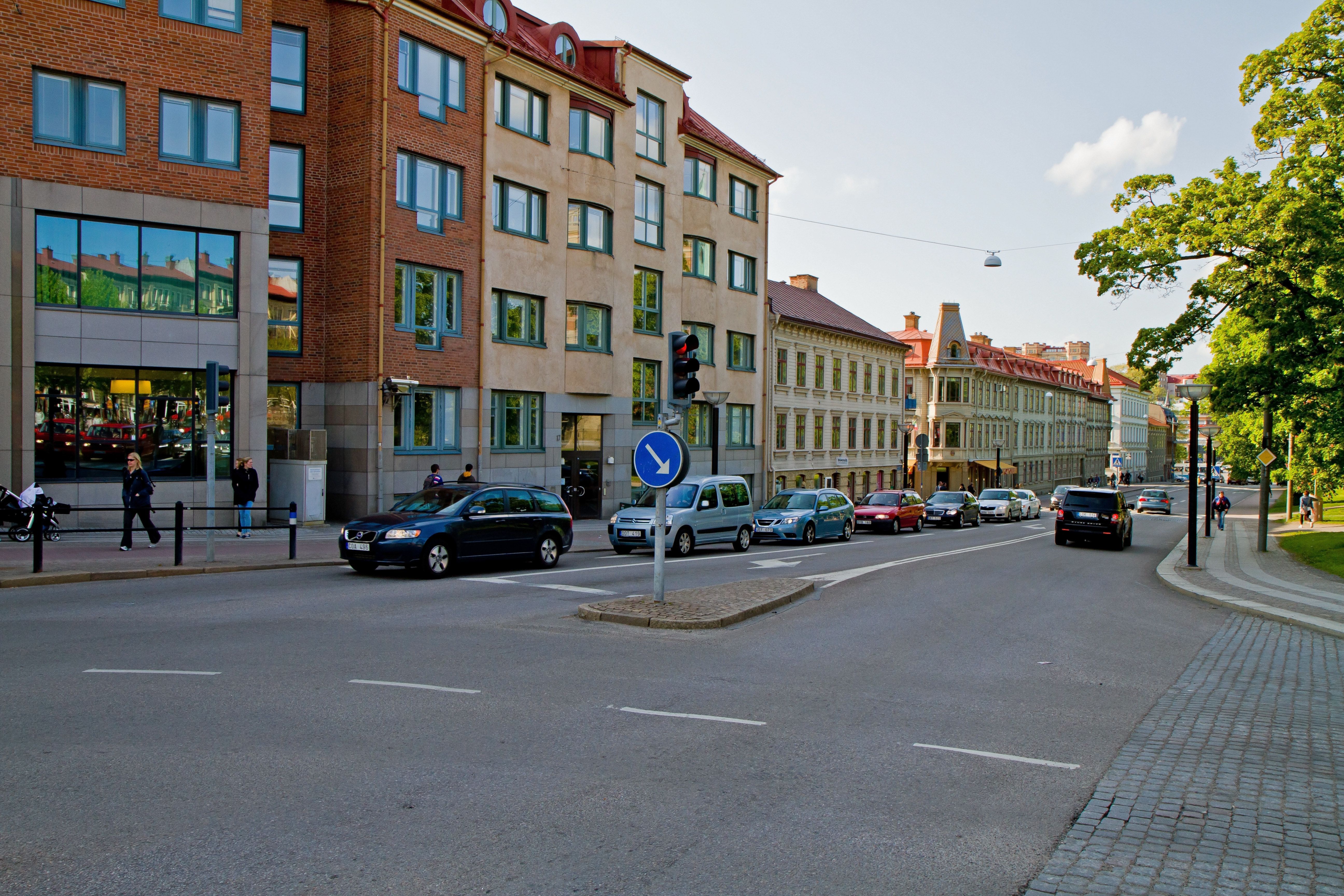 Sprängkullsgatan, Maj 2011